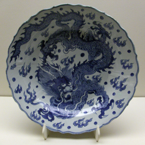 Museum für Ostasiatische Kunst Berlin Museum für Asiatische Kunst Native nameMuseum für Asiatische KunstLocationBerlinEstablished4 December 2006Website[1]Authority control VIAF: 264574948 SUDOC: 156286424 BNF: 16550747g